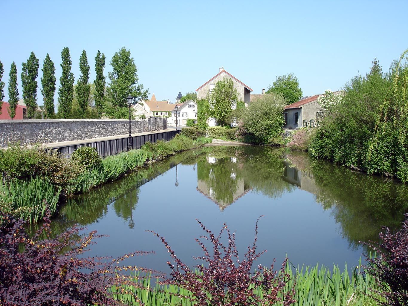 Abreuvoir de Villiers-le-Sec (Val-d'Oise), France